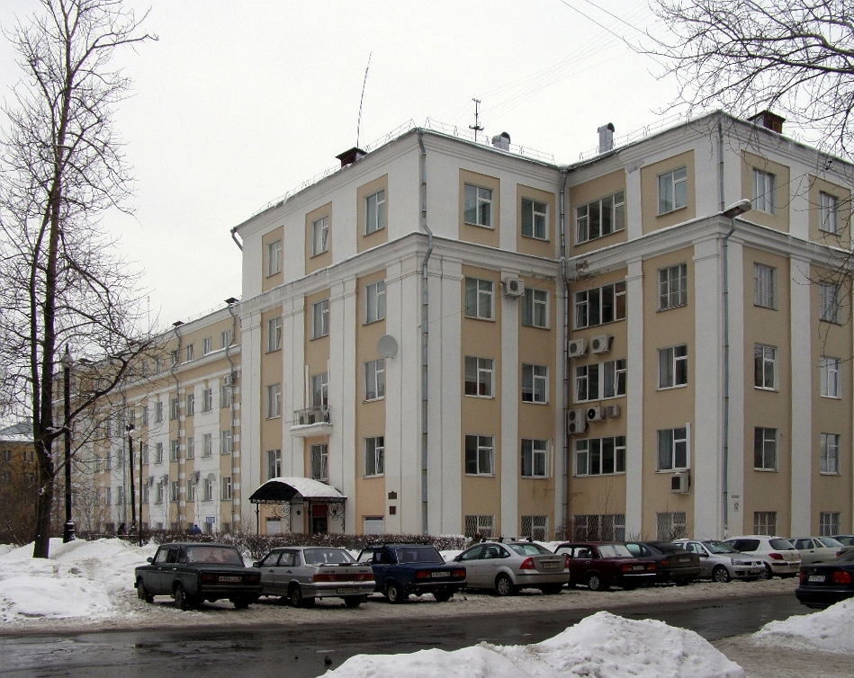 Здание Петрозаводского колледжа железнодорожного транспорта и Петрозаводского отделения Октябрьской железной дороги